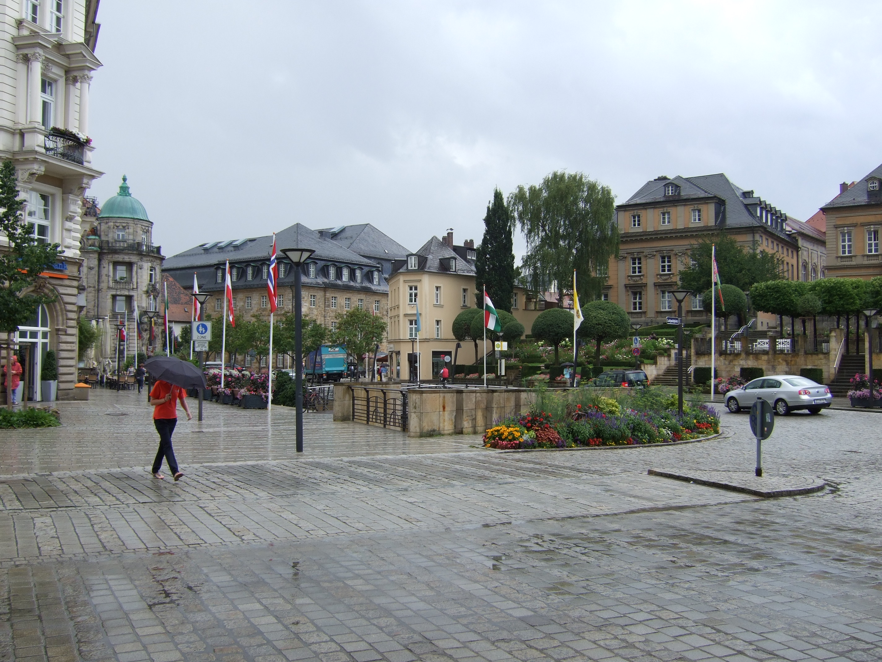 Bayreuth La-Spezia-Platz